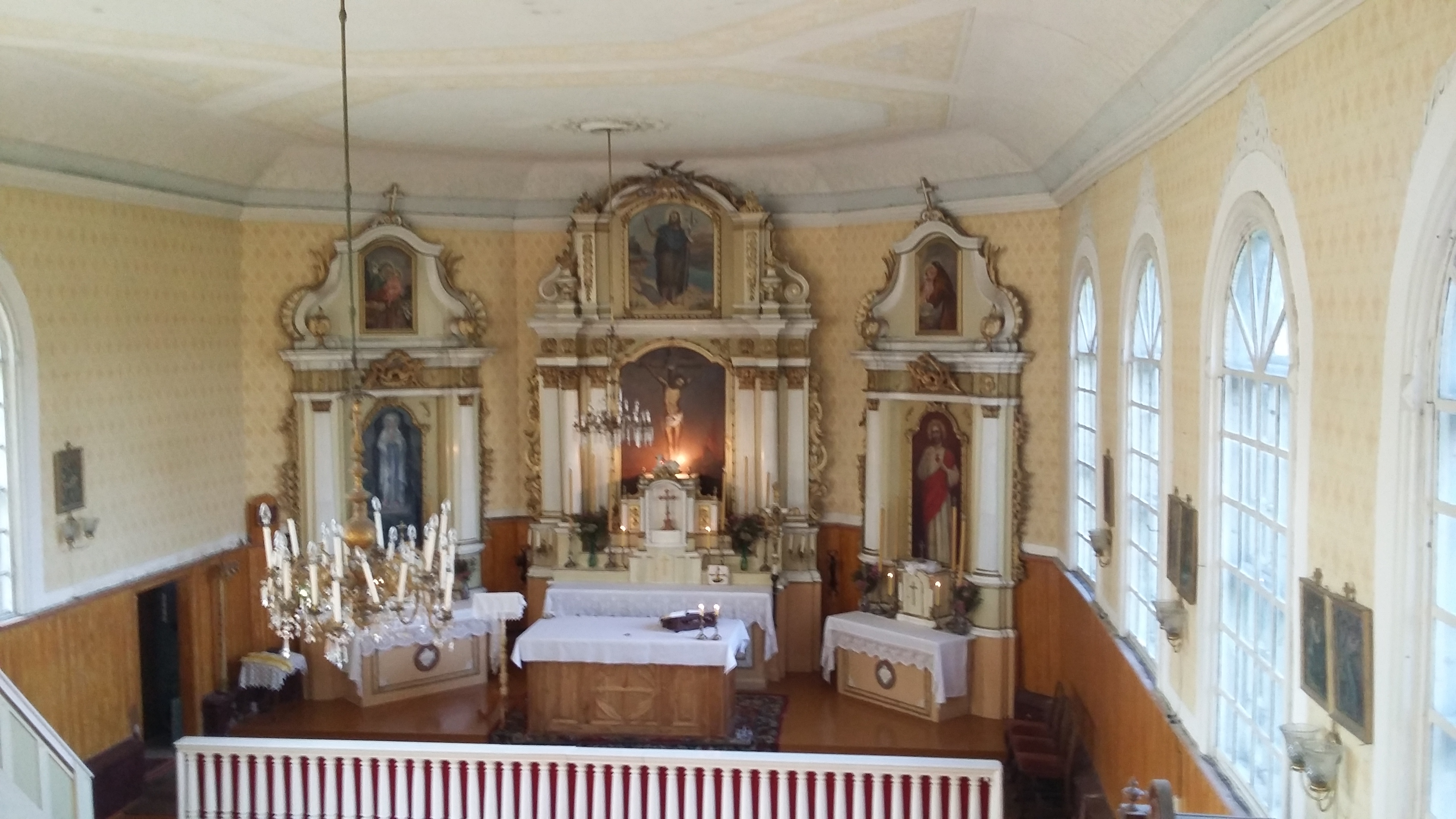 Brunavas katoļu baznīcas altāri